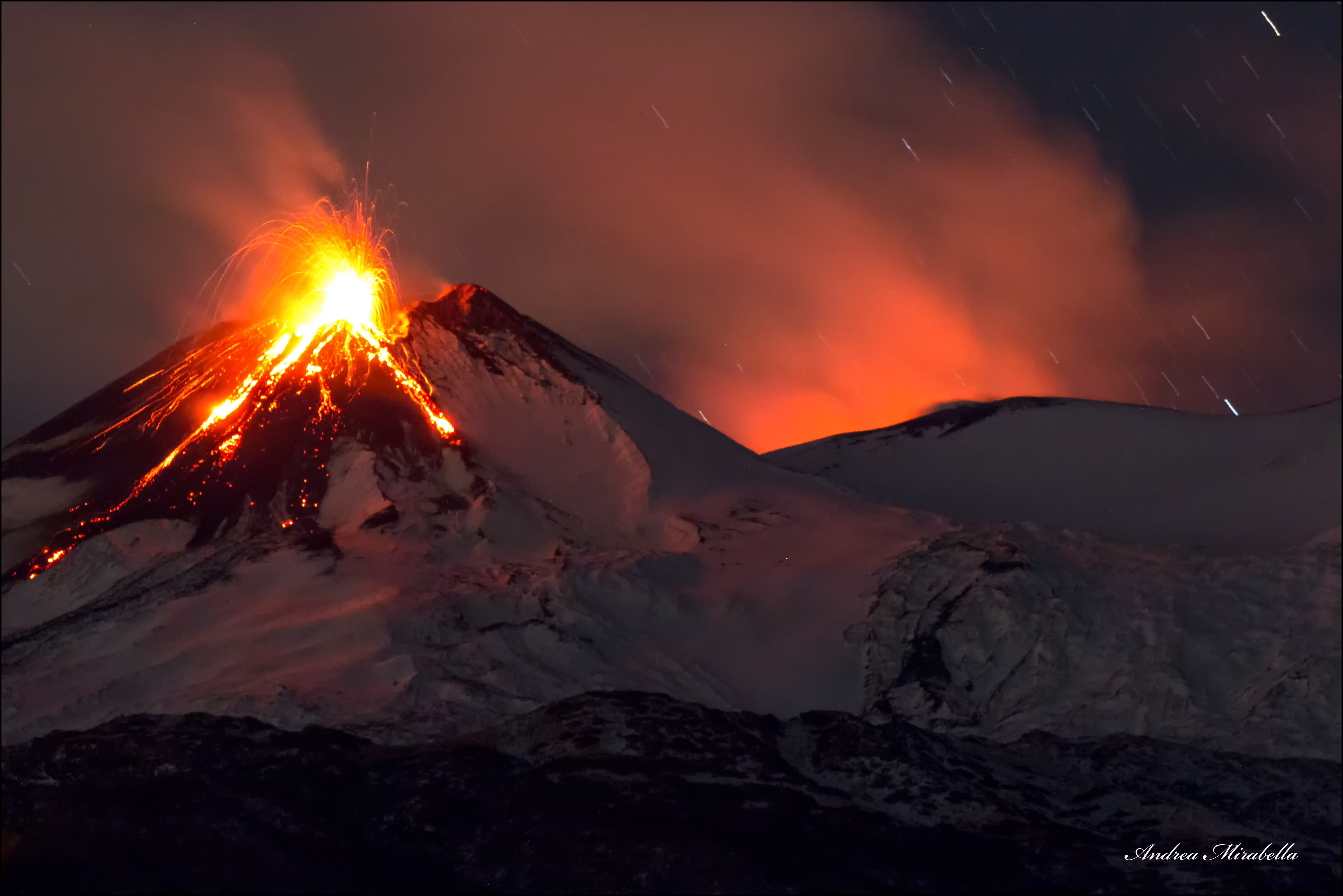 Etna eruzione del 07-12-2018